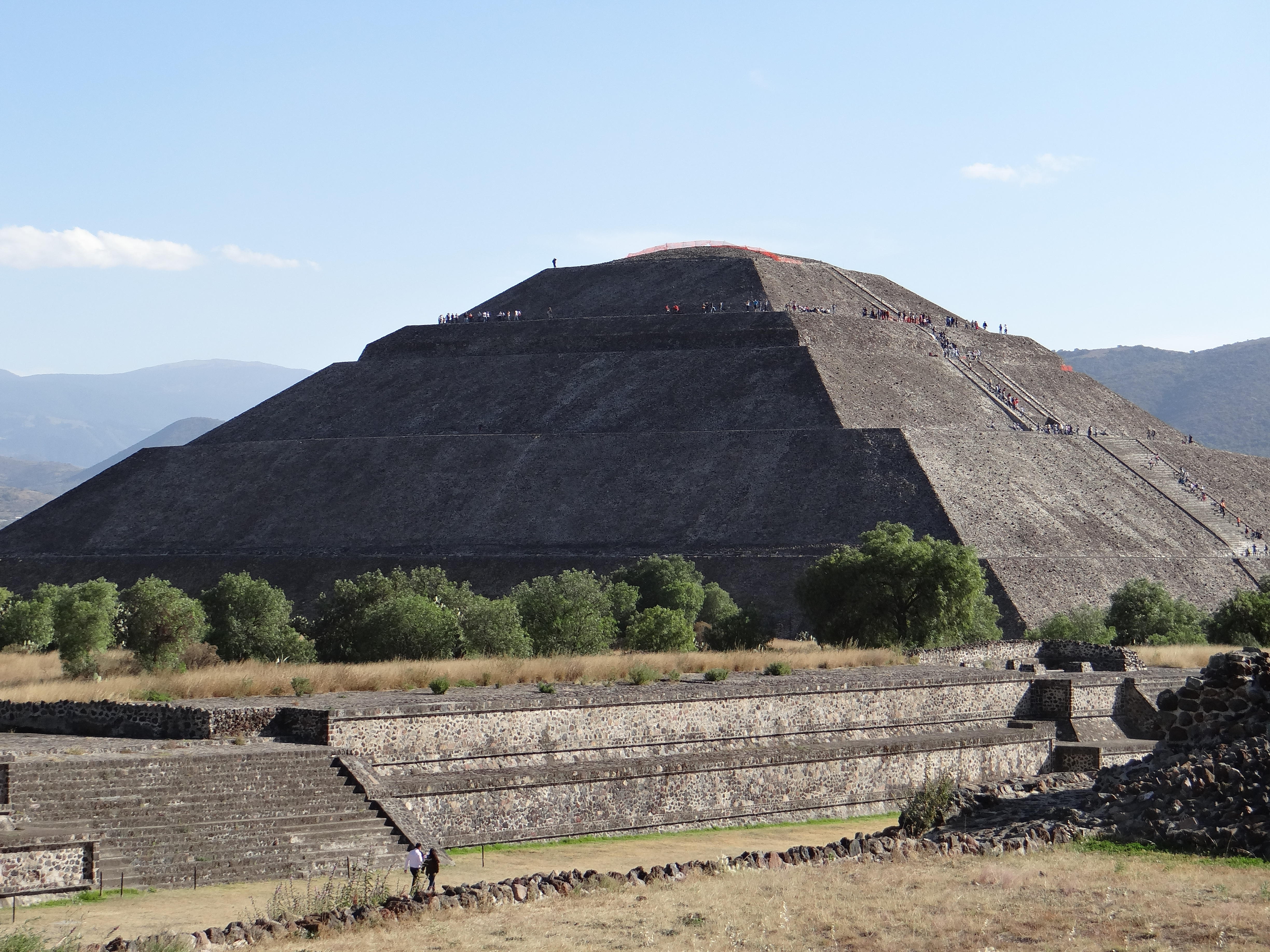 Es Magnífica.